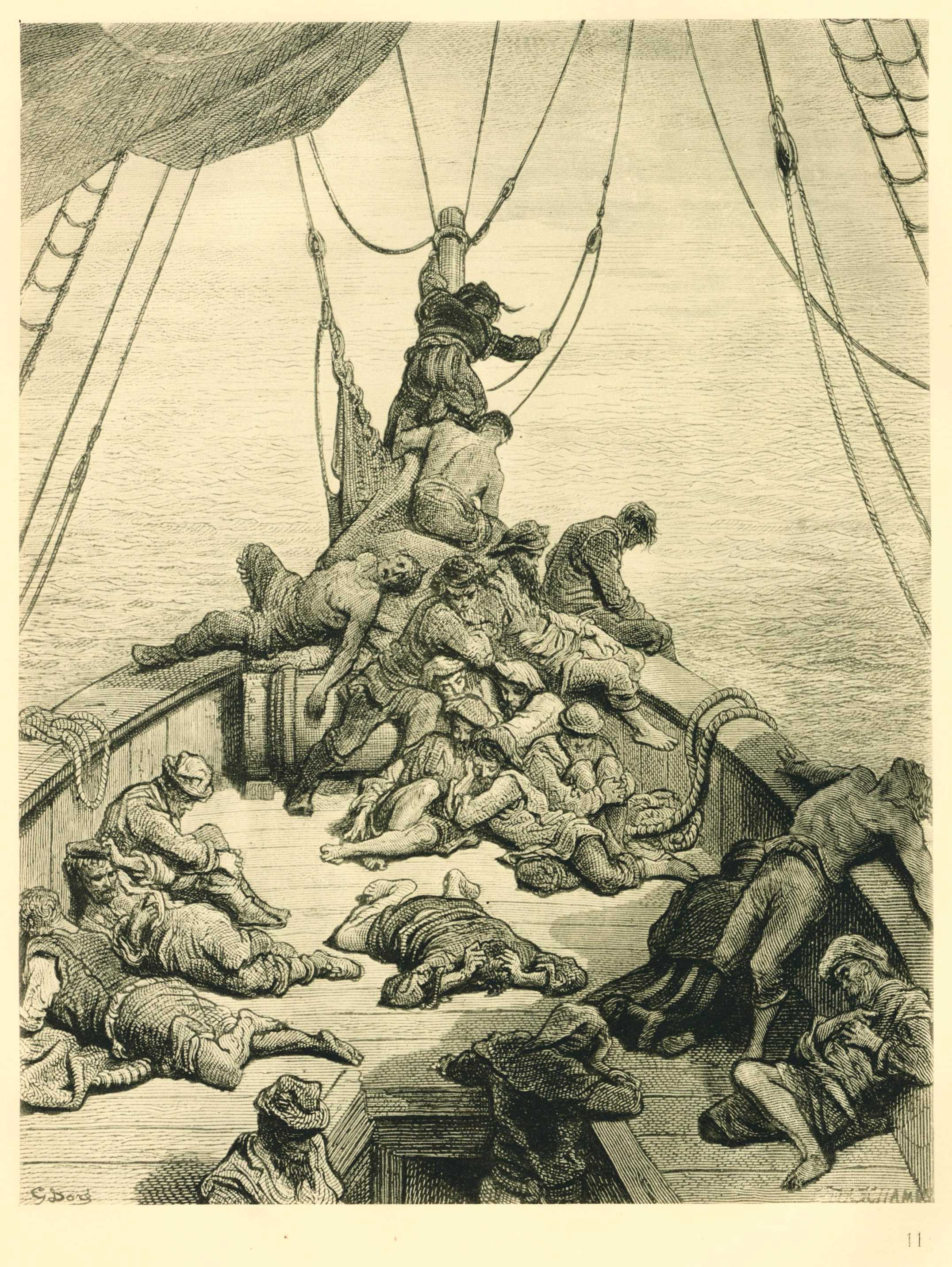 Wasser, Wasser überall! nur was zu trinken schafft! (Beschreibung lt. Quelle)